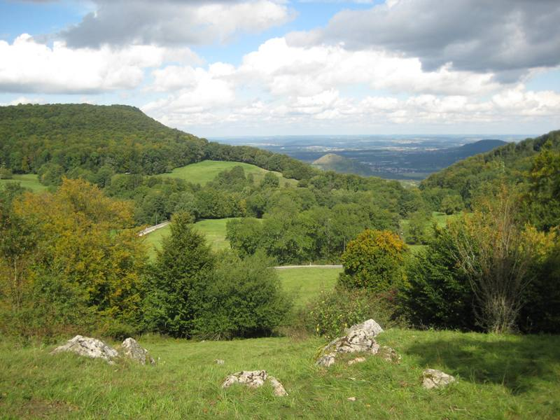 Vulkankrater Randecker Maar, Zeugnis des Schwäbischen Vulkan